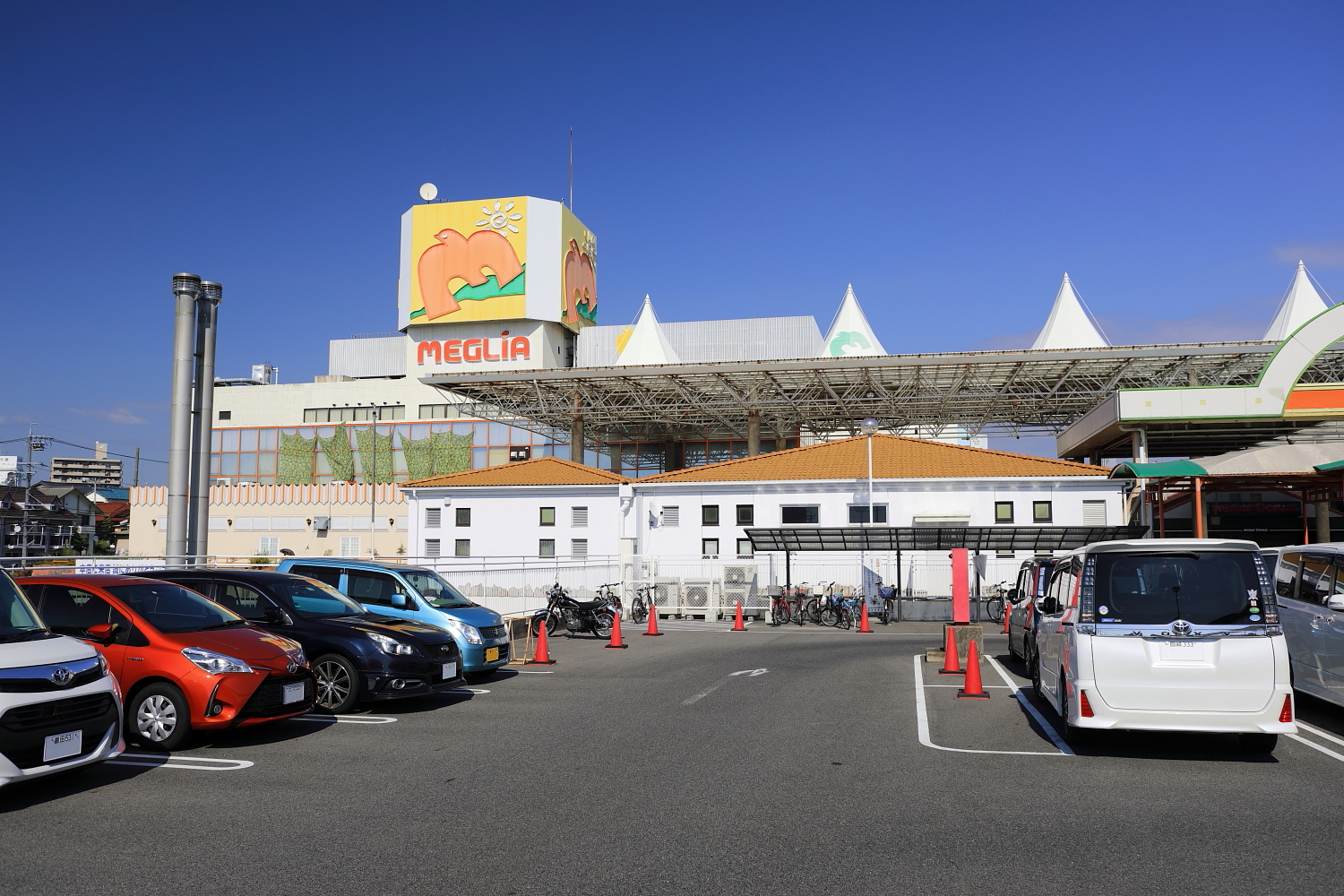 メグリア本店（豊田市山之手、2019年（令和元年）9月）